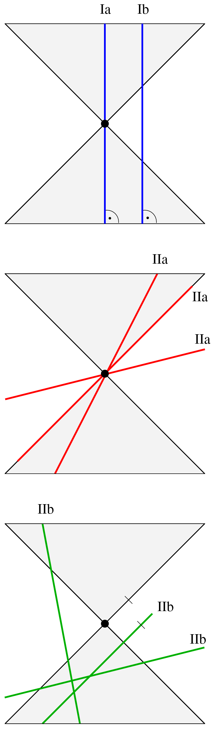 Kegelschnitt-Fälle